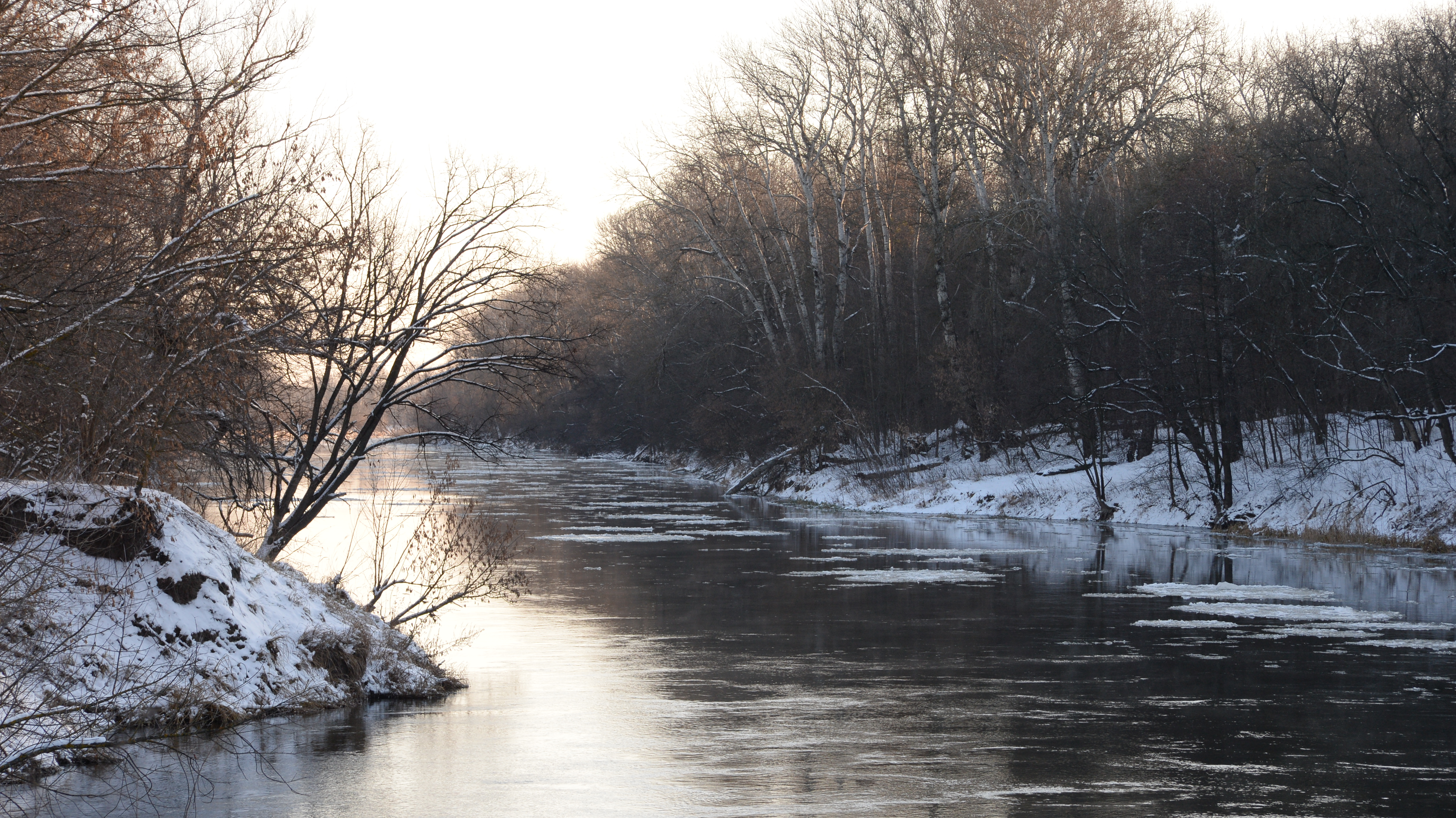 река Северский Донец у села Яремовка